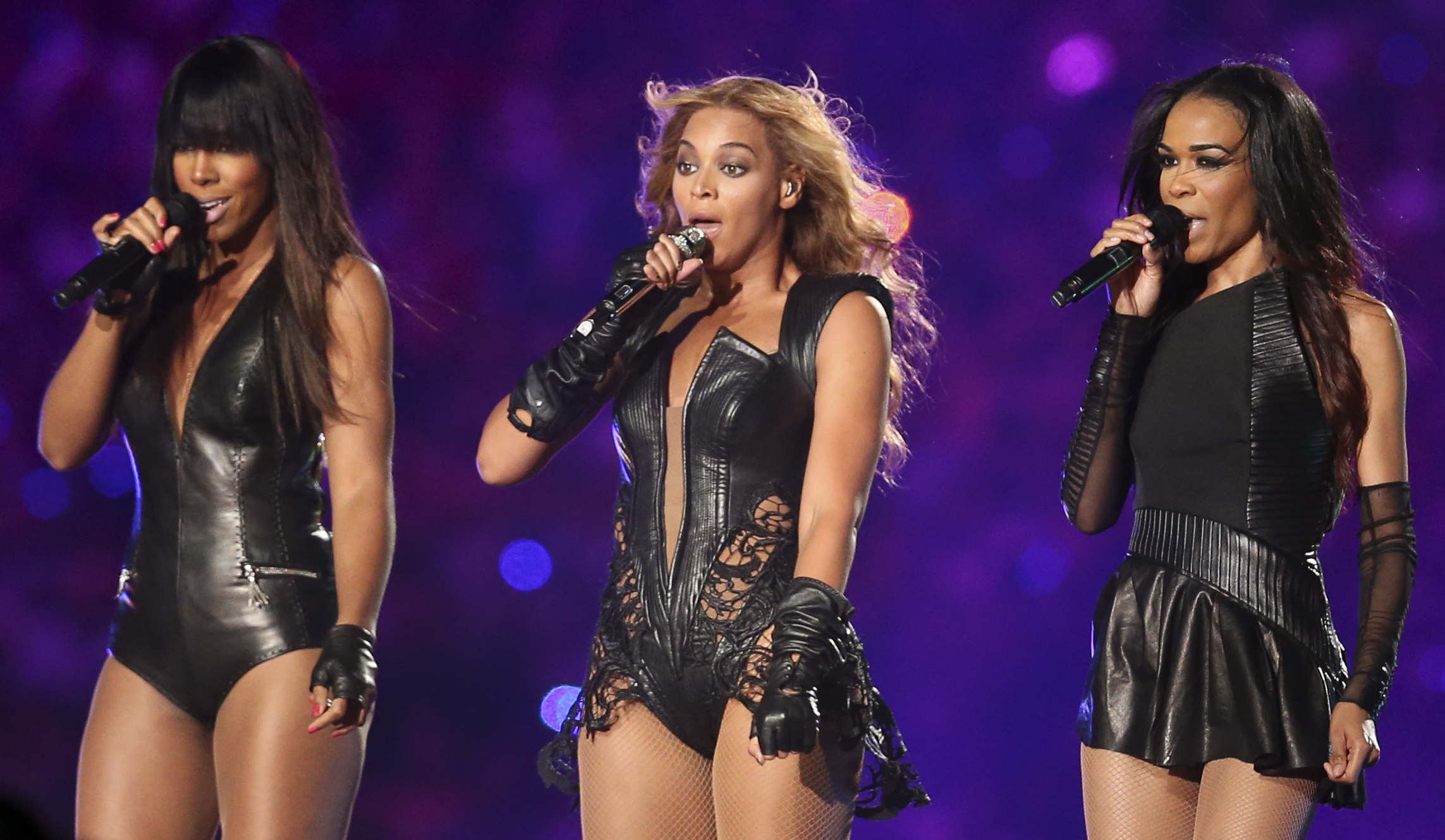 DW2Q0666